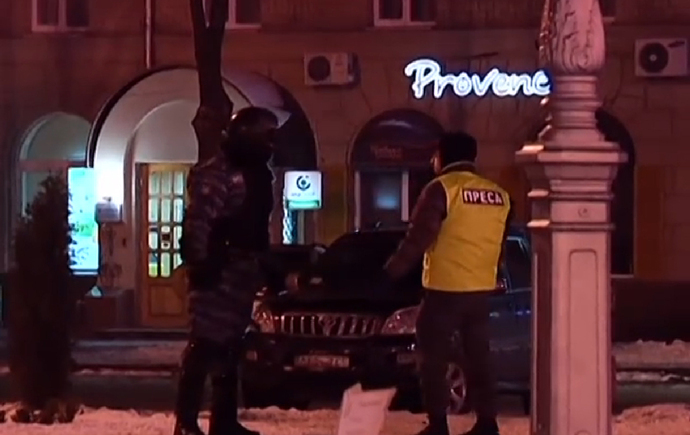 Нічний штурм Черкаської ОДА 27 ciчня 2014. Справа знаходиться оператор черкаського телеканалу «ВІККА» Сергій Ефімов, якому було пошкоджене вiдео обладнання.